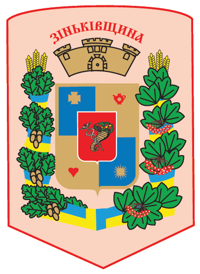 Герб Зінківського району